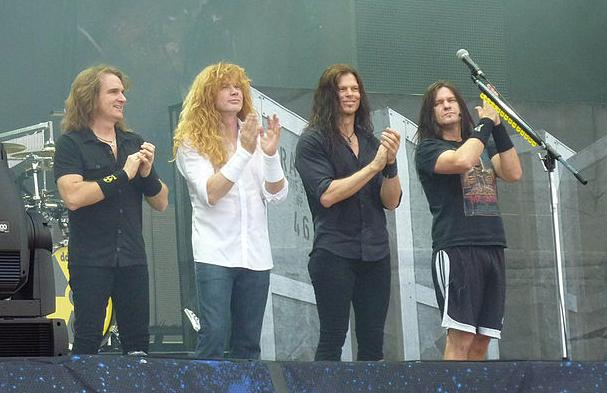 Megadeth actuando en el Sonisphere 2010 en la República Checa.